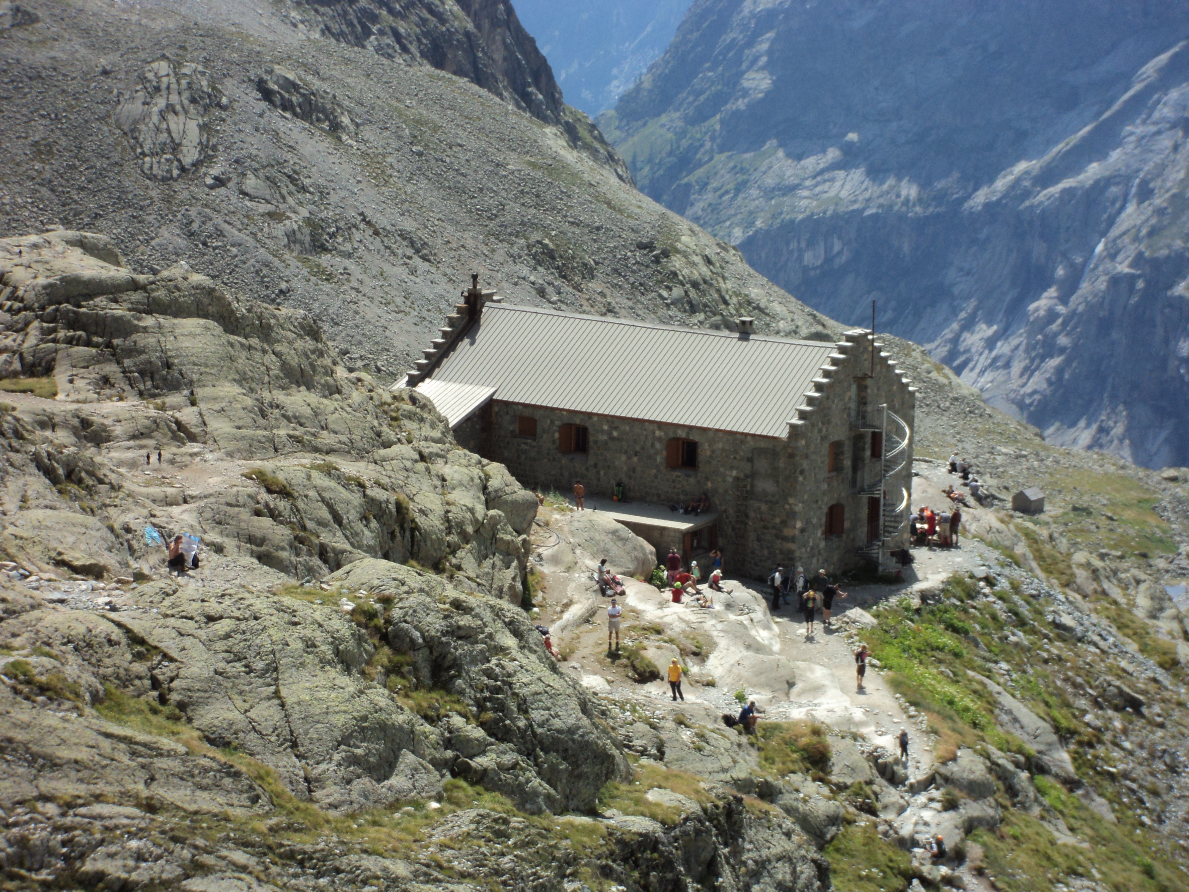 Il Refuge du Glacier Blanc - Massiccio des Écrins - Francia